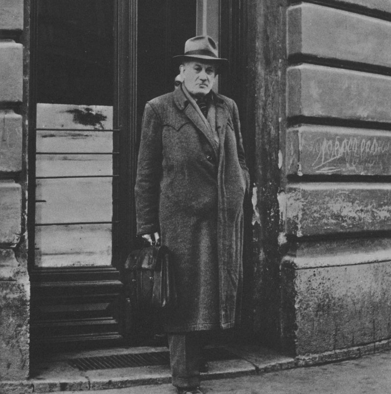 Tin Ujević izlazi iz bifea "Tip-top" u Zagrebu